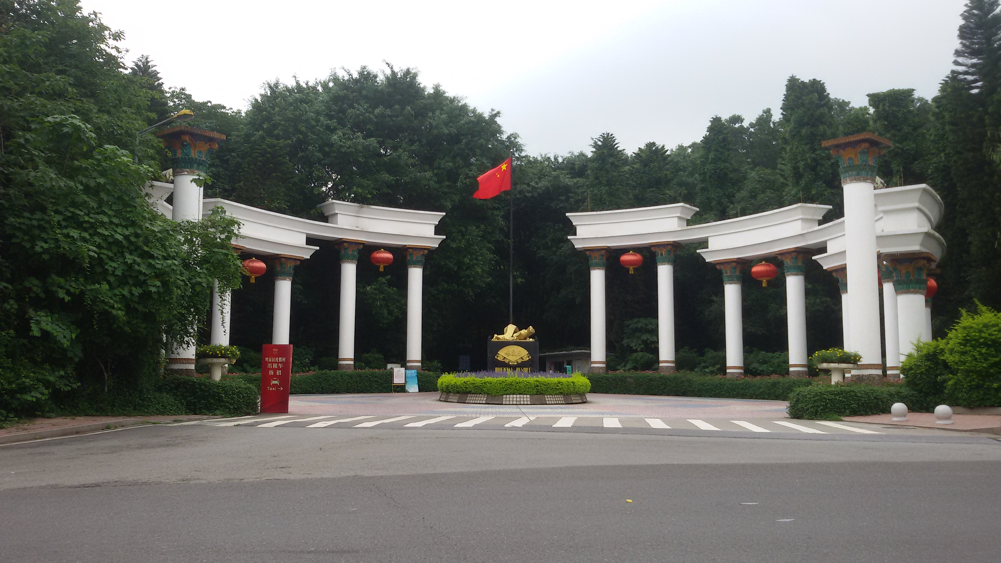 粵語: 鳴泉居度假村